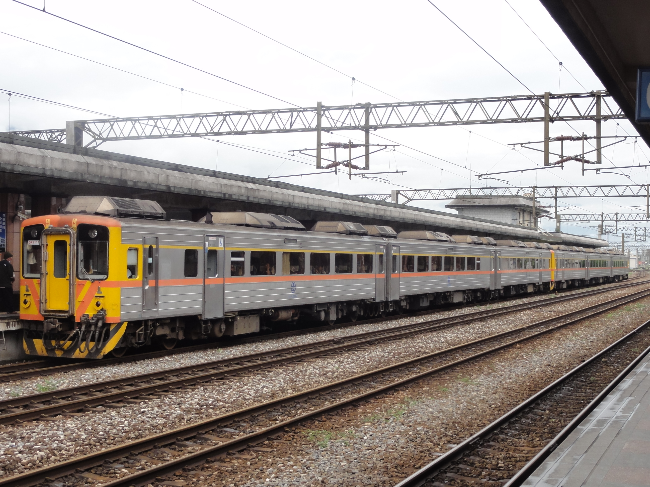 台鉄DR3100型